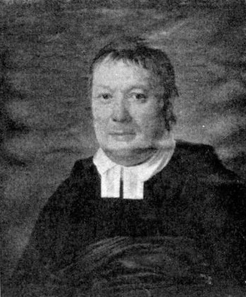 Johan Ulric Blomdahl (1762-1836). Prästrock och kappa, prästkrage, ljusgrå fond.